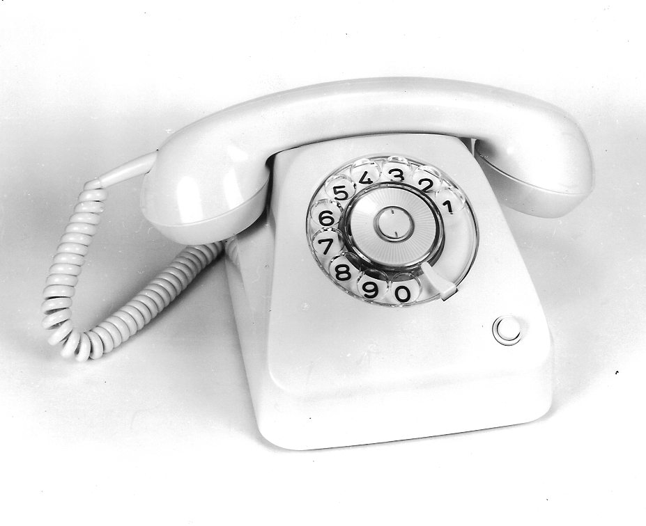 Telefon Tischapp 1976, Österreich